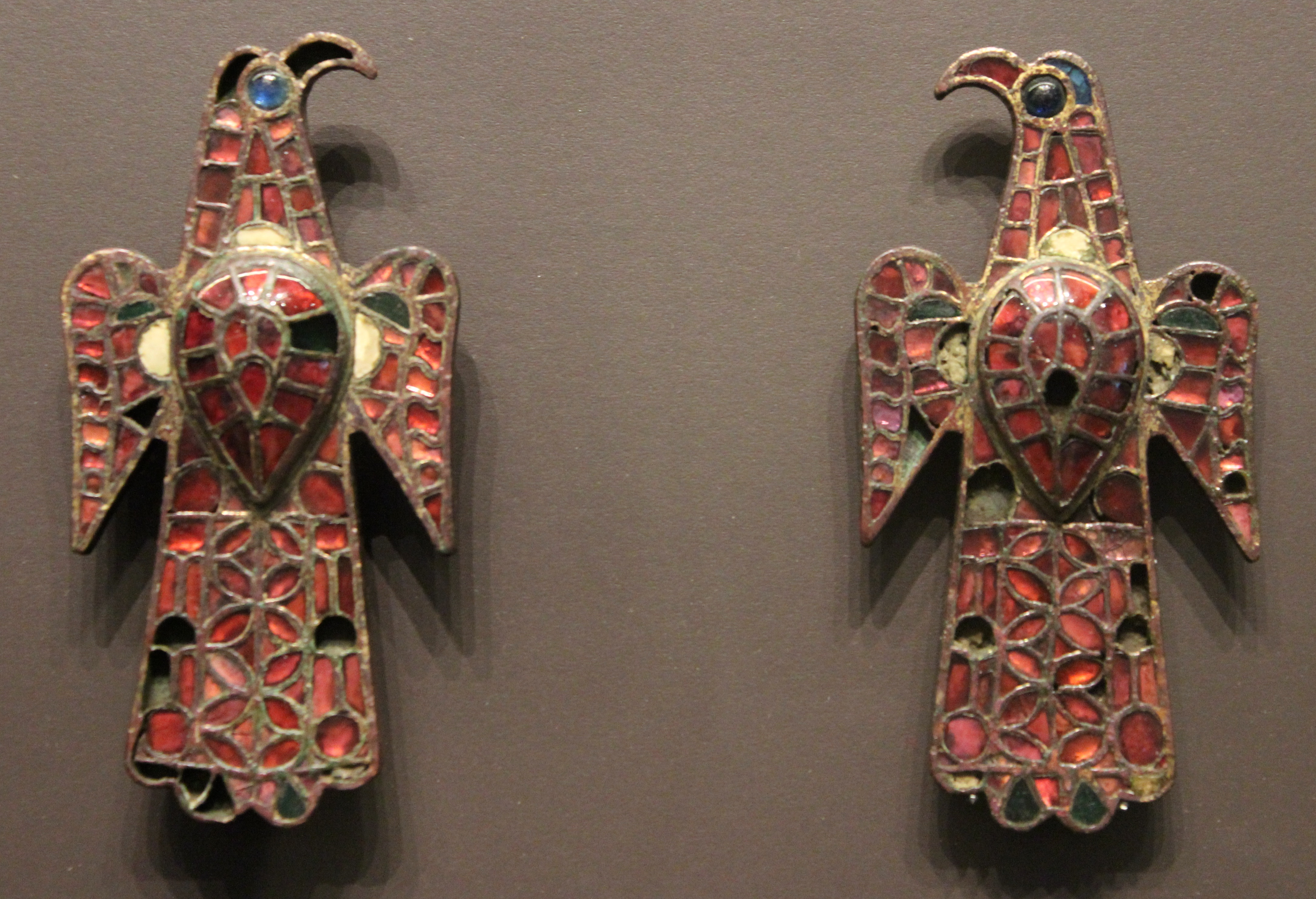 Fíbulas visigóticas de Alovera. Madrid, M.A.N.